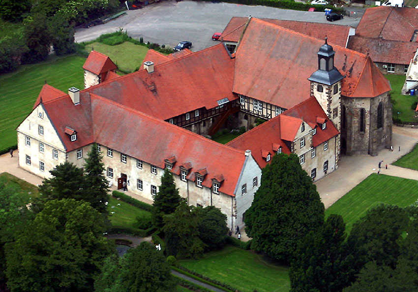 Luftaufnahme des sanierten Klosters Haydau, Hessen, Deutschland